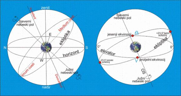 Nebeska sfera.